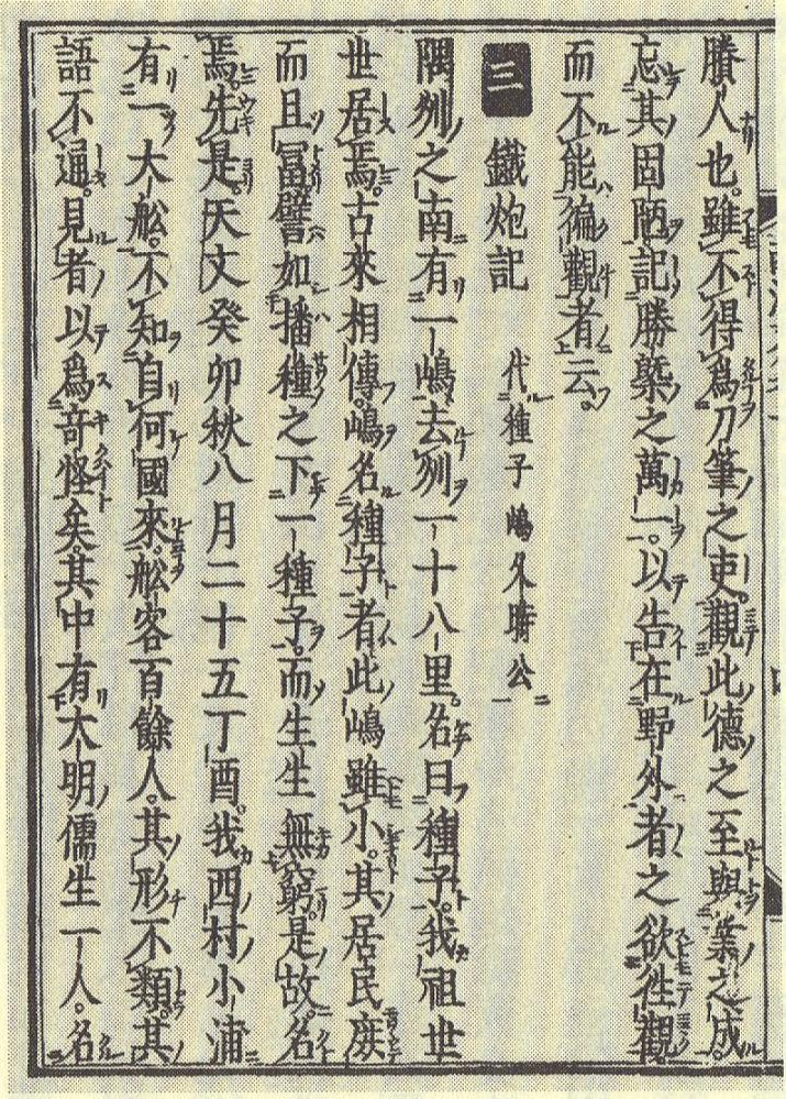 鐵炮記的內頁。